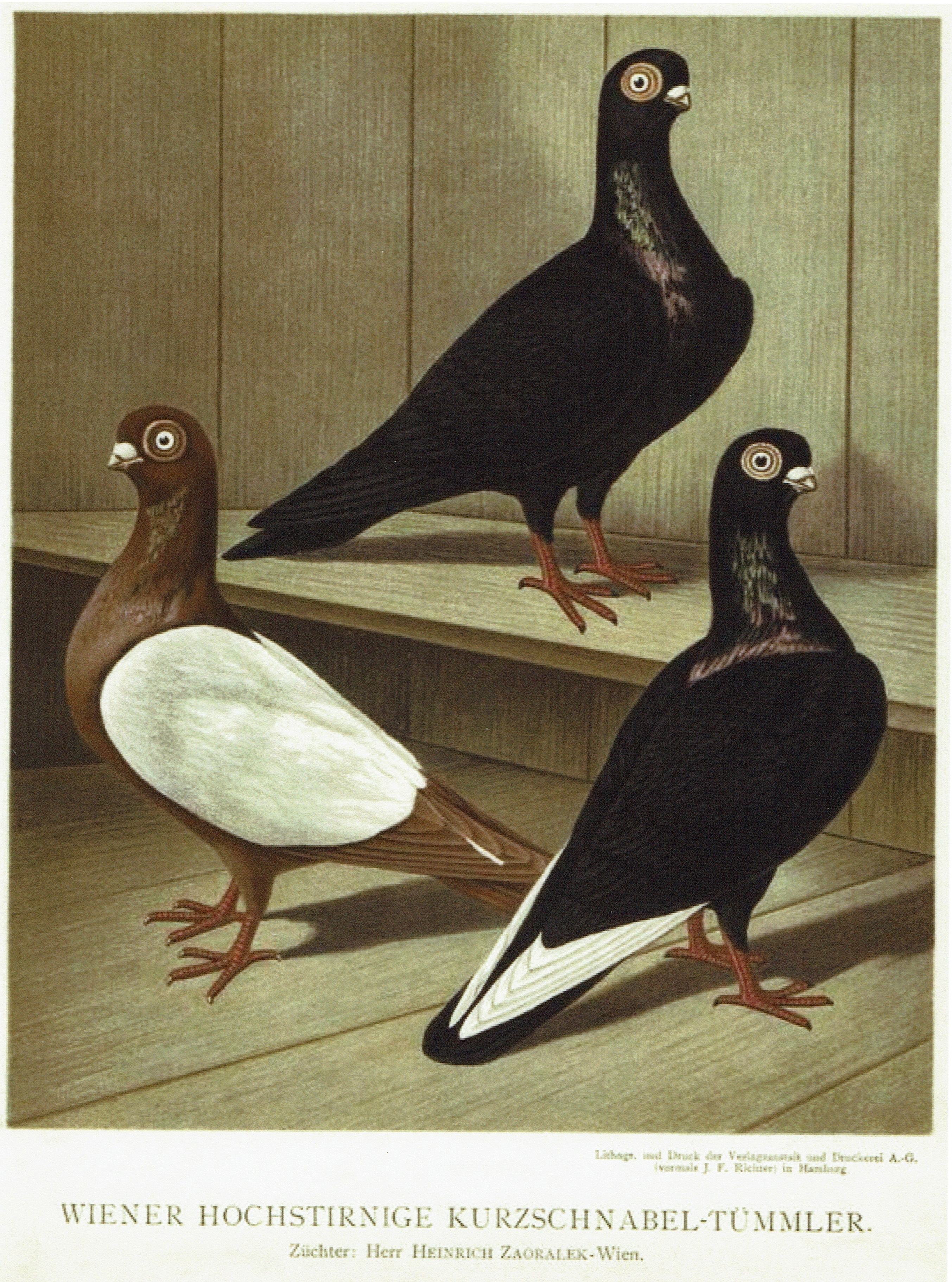 Wiener Hochstirnige Kurzschnabel-Tümmler von Heinrich Zaoralek